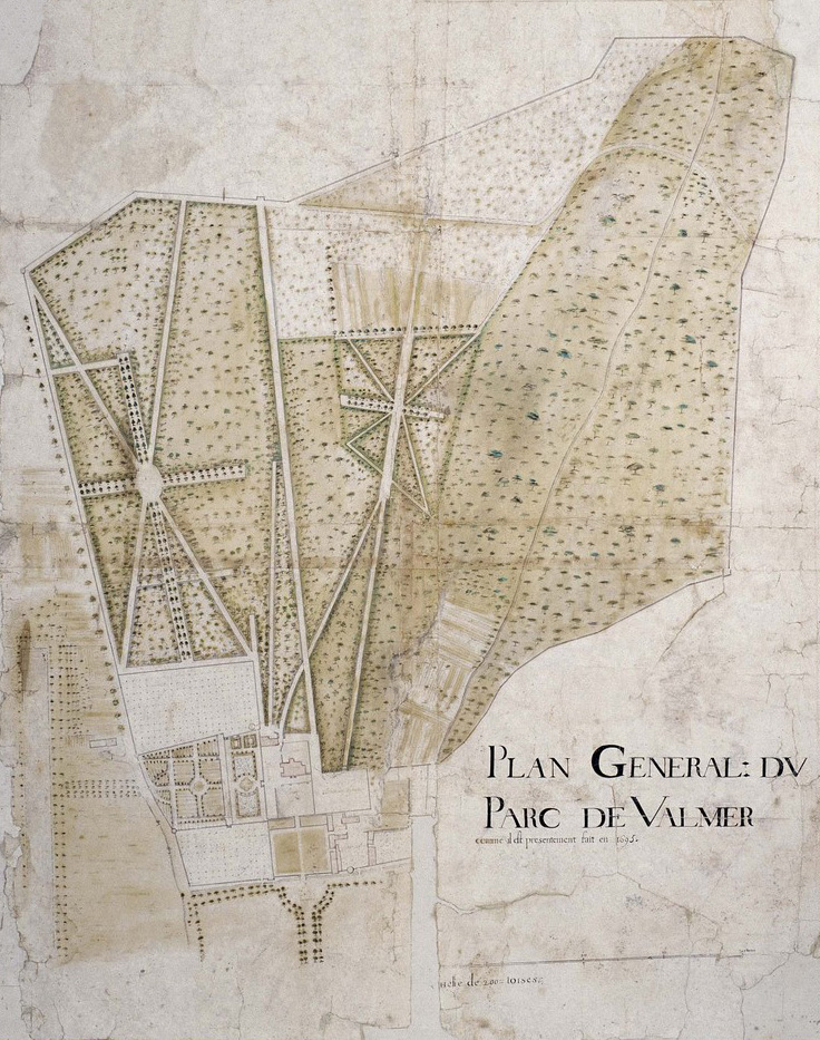 Plan der Schlossanlage Valmer, indre-et-Loire